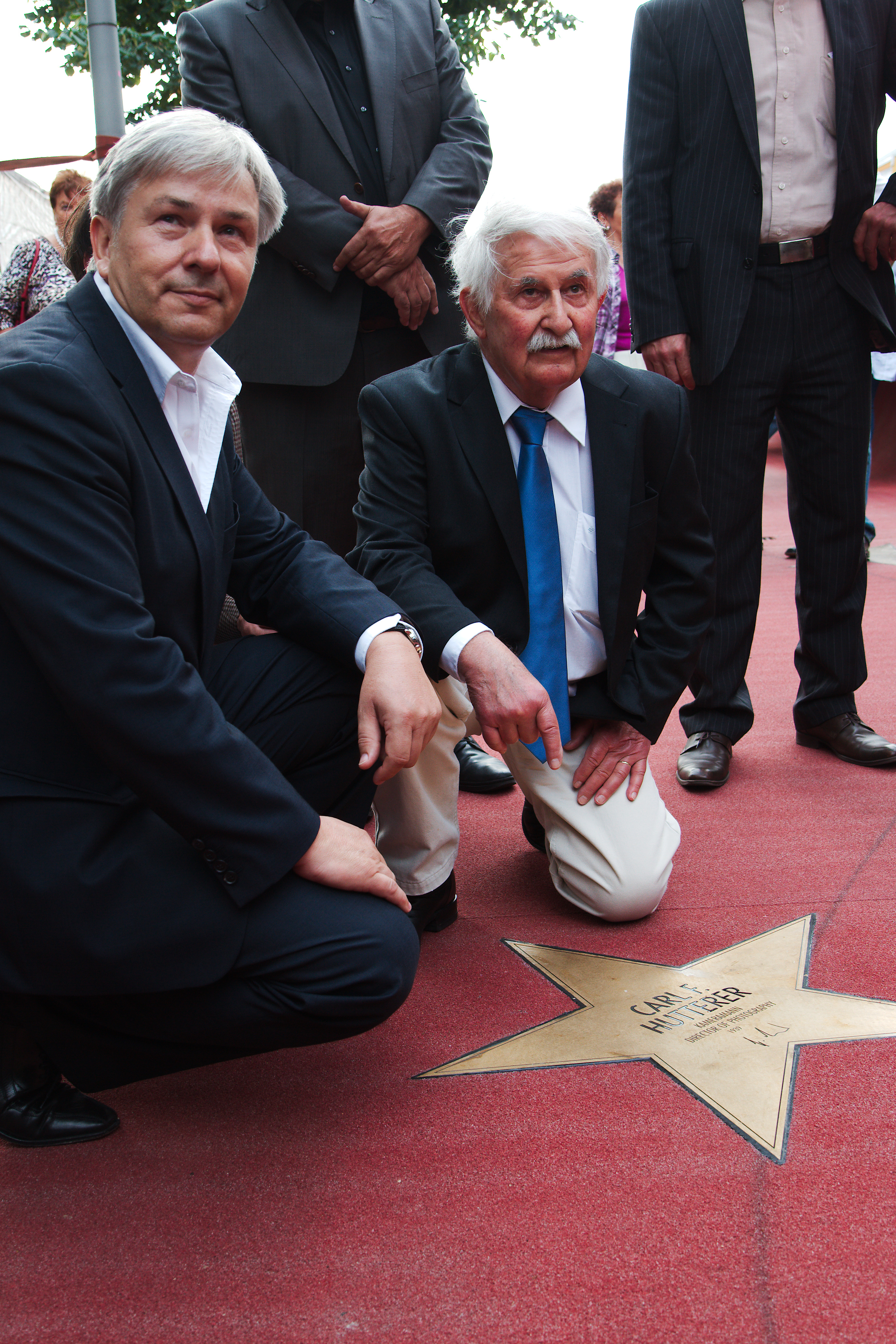 Mit Klaus Wowereit